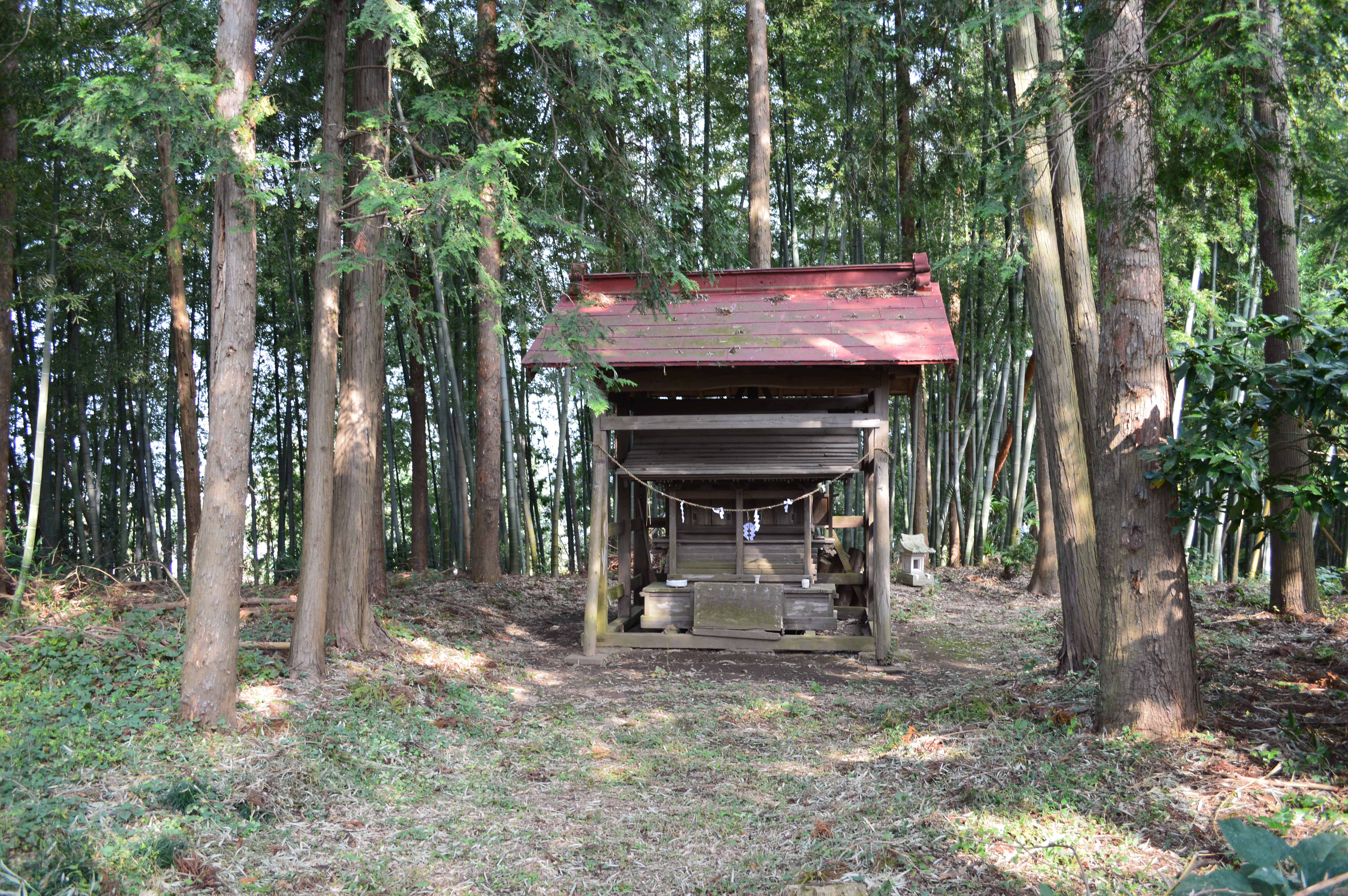 葦間山古墳 後円部墳頂